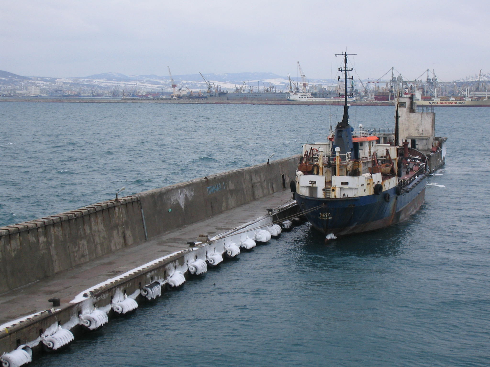 Jetée de transbordement Pier Novorossiysk.